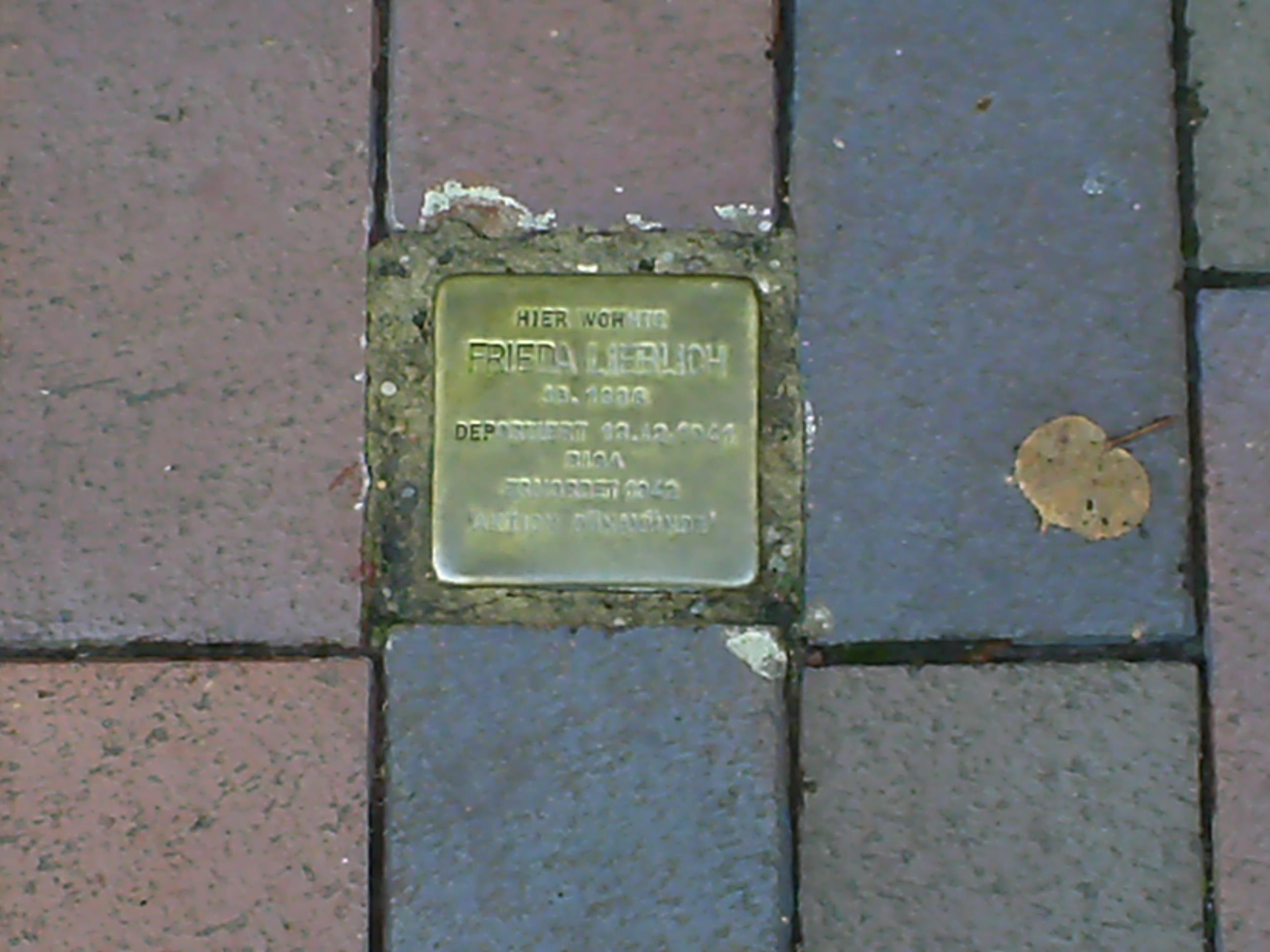 Stolpersteine Osnabrück Lieblich